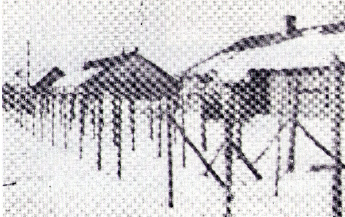 Koverin keskitysleiri